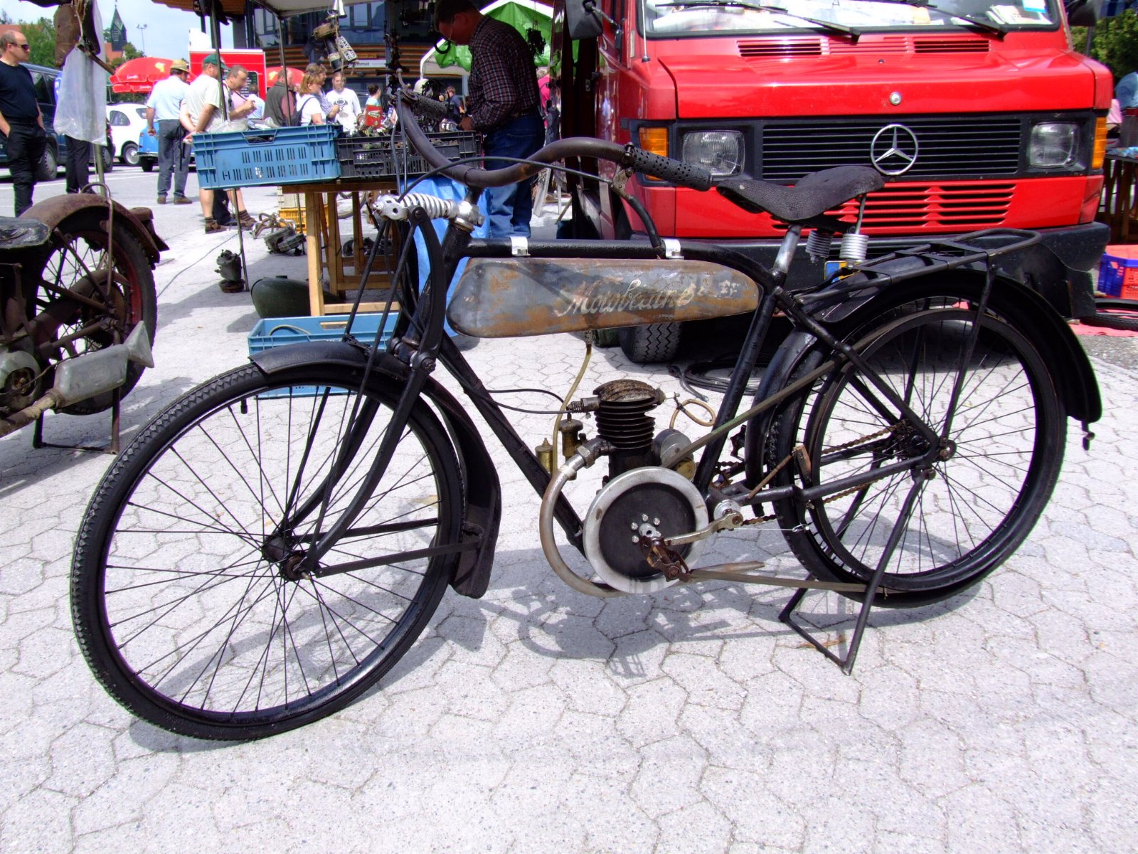 Motobecane Motorrad